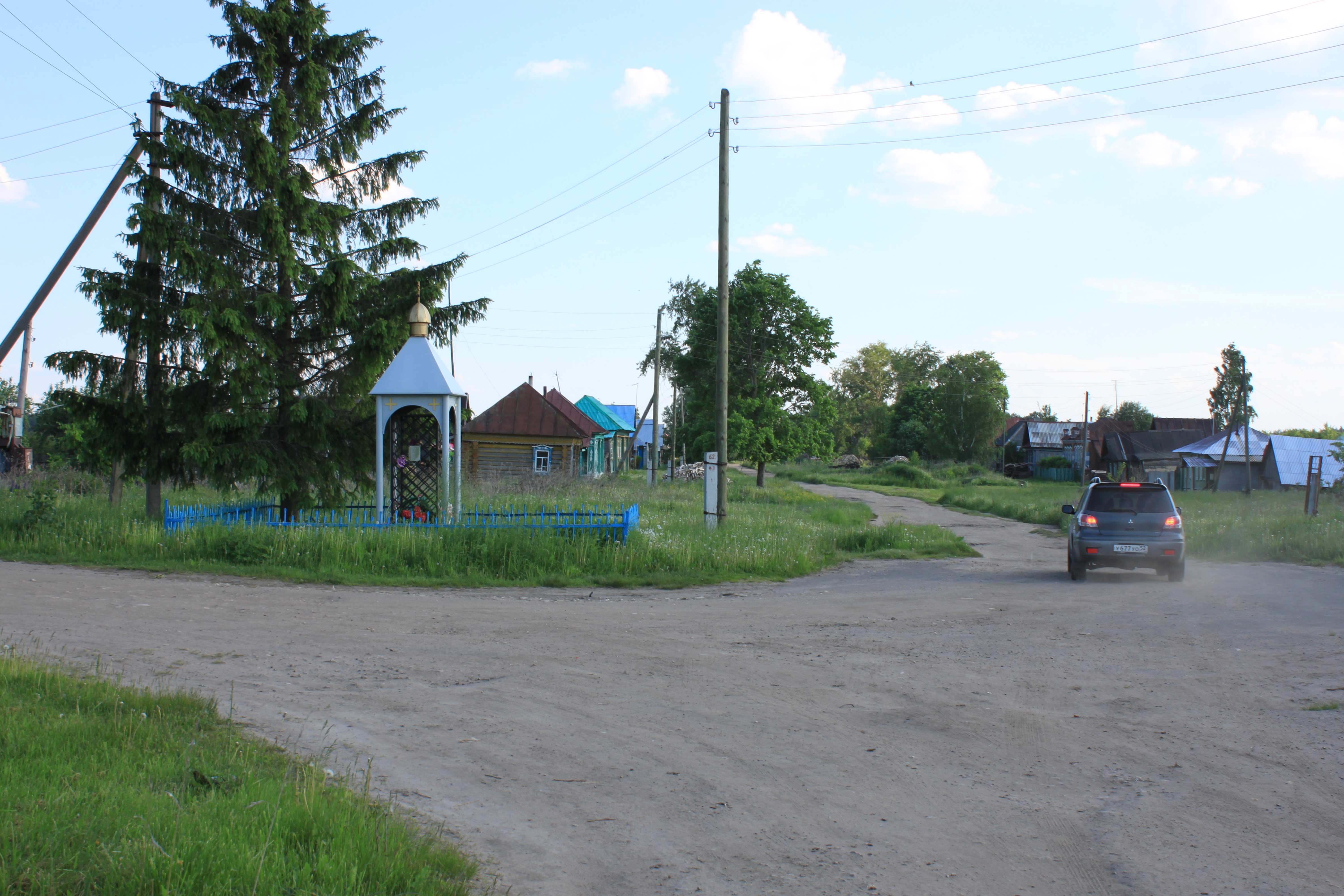 Котиха Арзамасский район